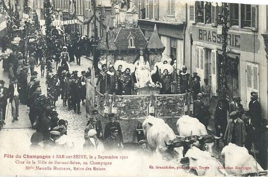 Le Char de la Reine des Reines de Bar-sur-Seine aux Fêtes du Champagne à Bar-sur-Seine le 4 septembre 1921.